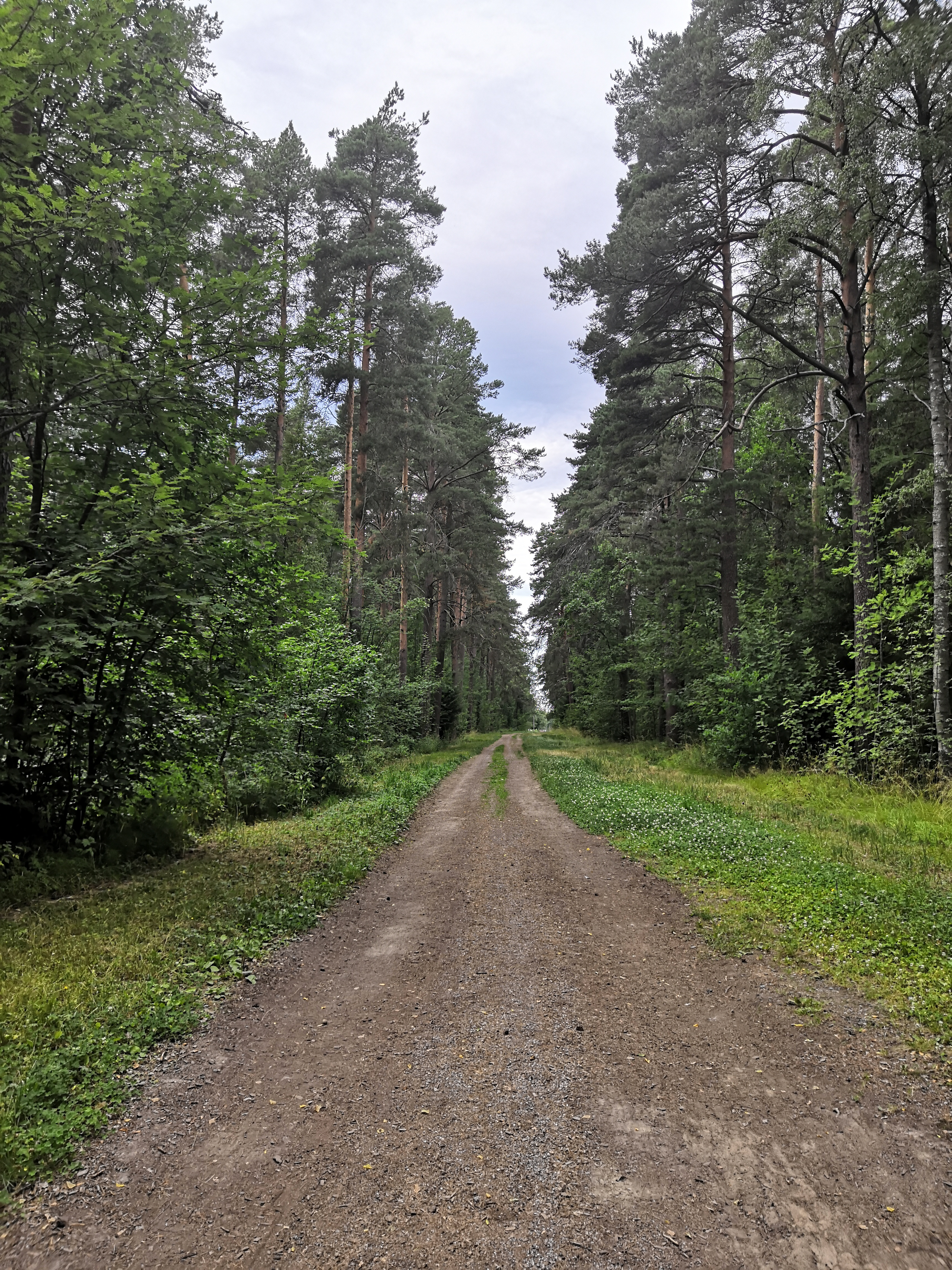 1800-luvun vaihteessa Kittholman kaupunginosaan Pietarsaaressa raivattiin suora ja leveä kaistale metsän halki köydenpunontarataa varten.